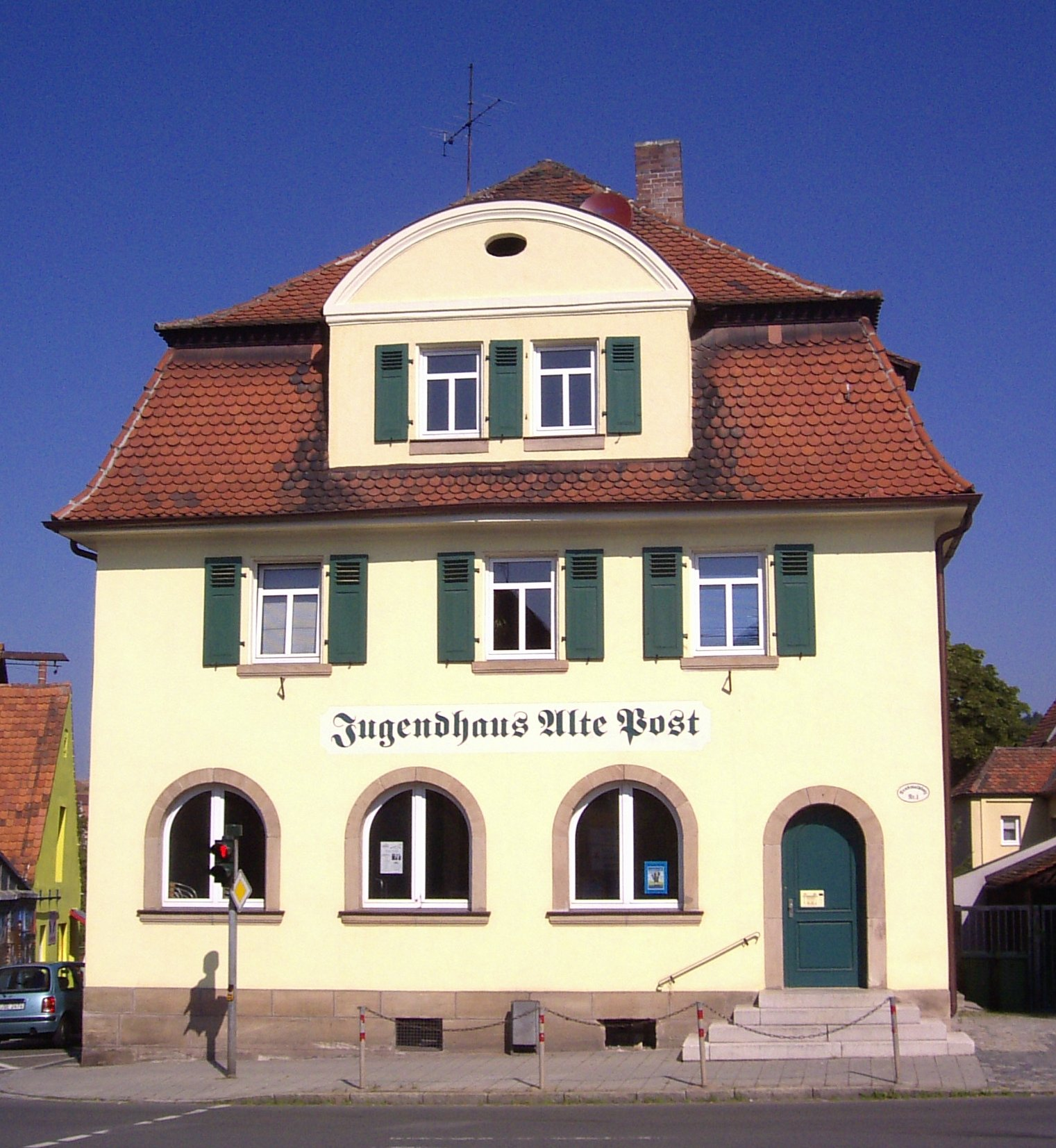 Das Jugendzentrum "Alte Post" der Stadt Langenzenn